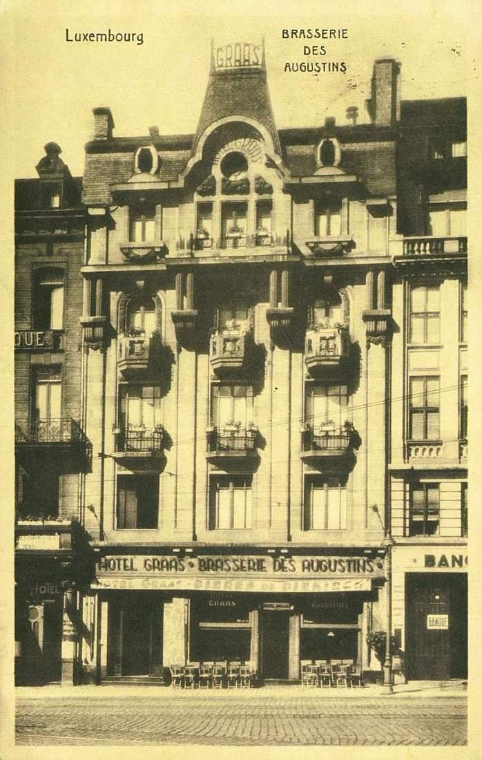 Luxembourg, 78 av. de la Liberté. Ancien Hôtel Graas avec la Brasserie des Augustins, vers 1930